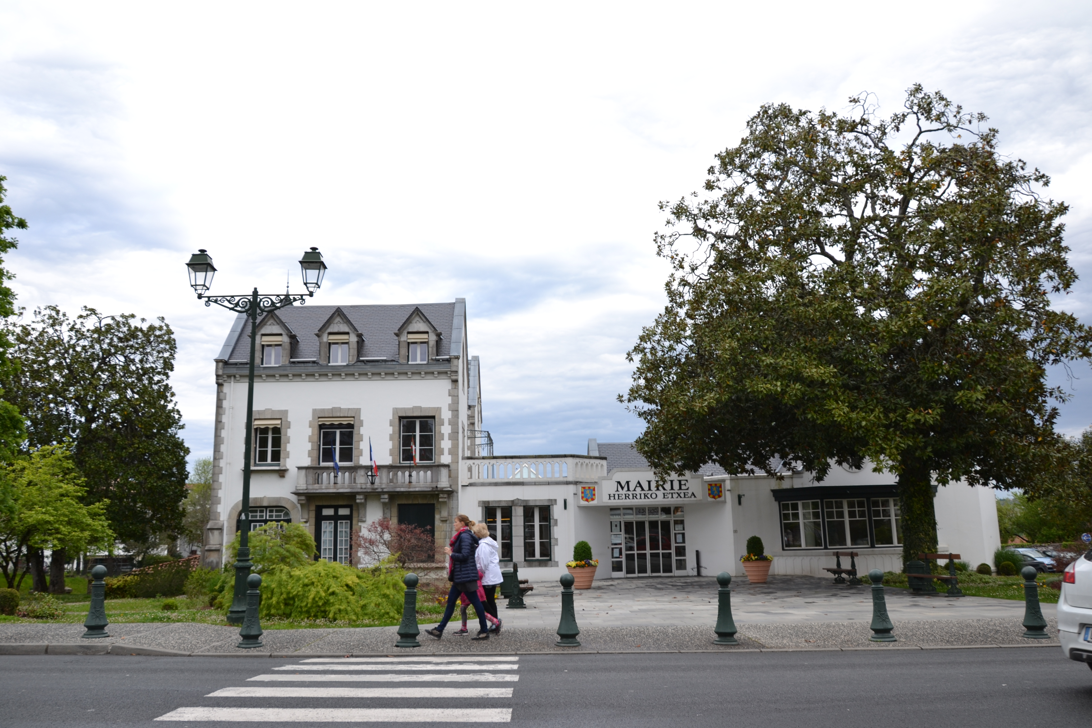 mairie de Cambo les Bains